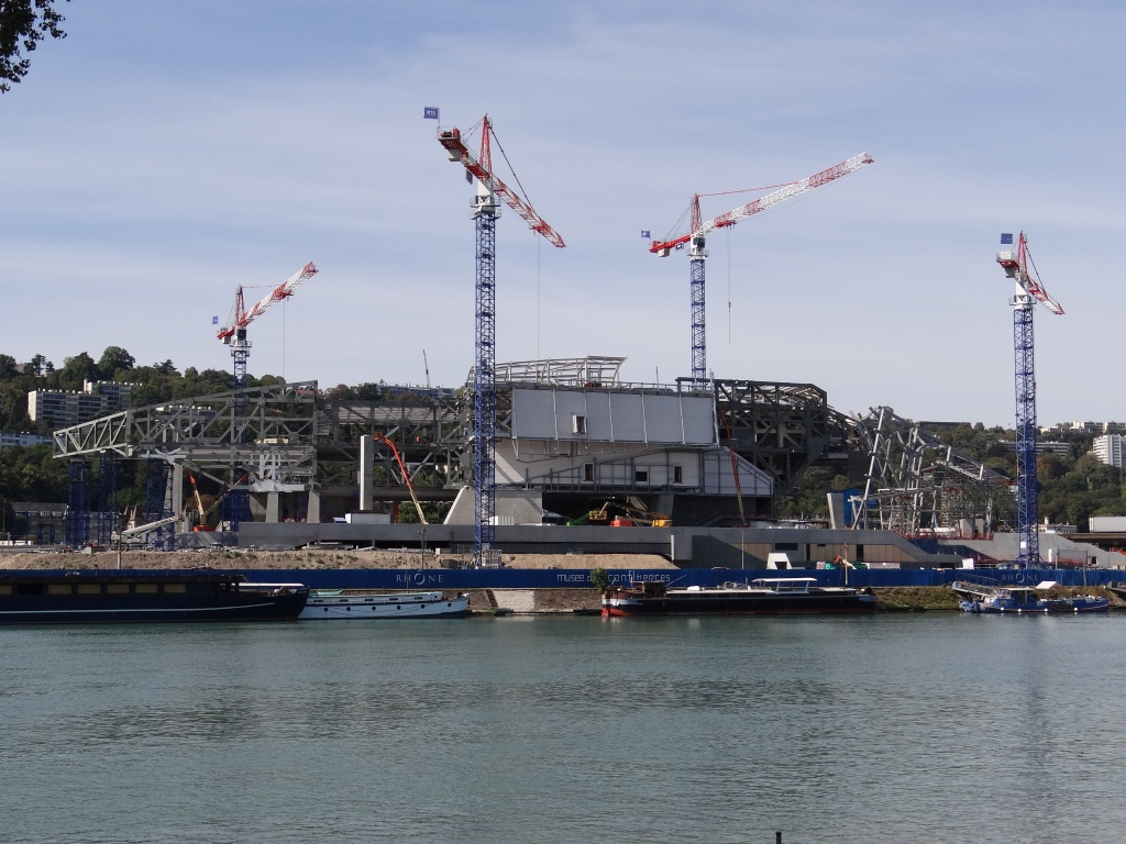 confluences